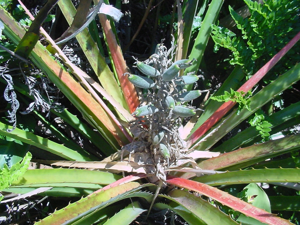 Bromelia antiacantha - BROMELIACEAE Imbituba - SC - Brasil.